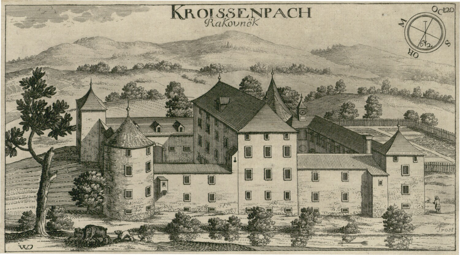 Grad Rakovnik (Kroisenbach)